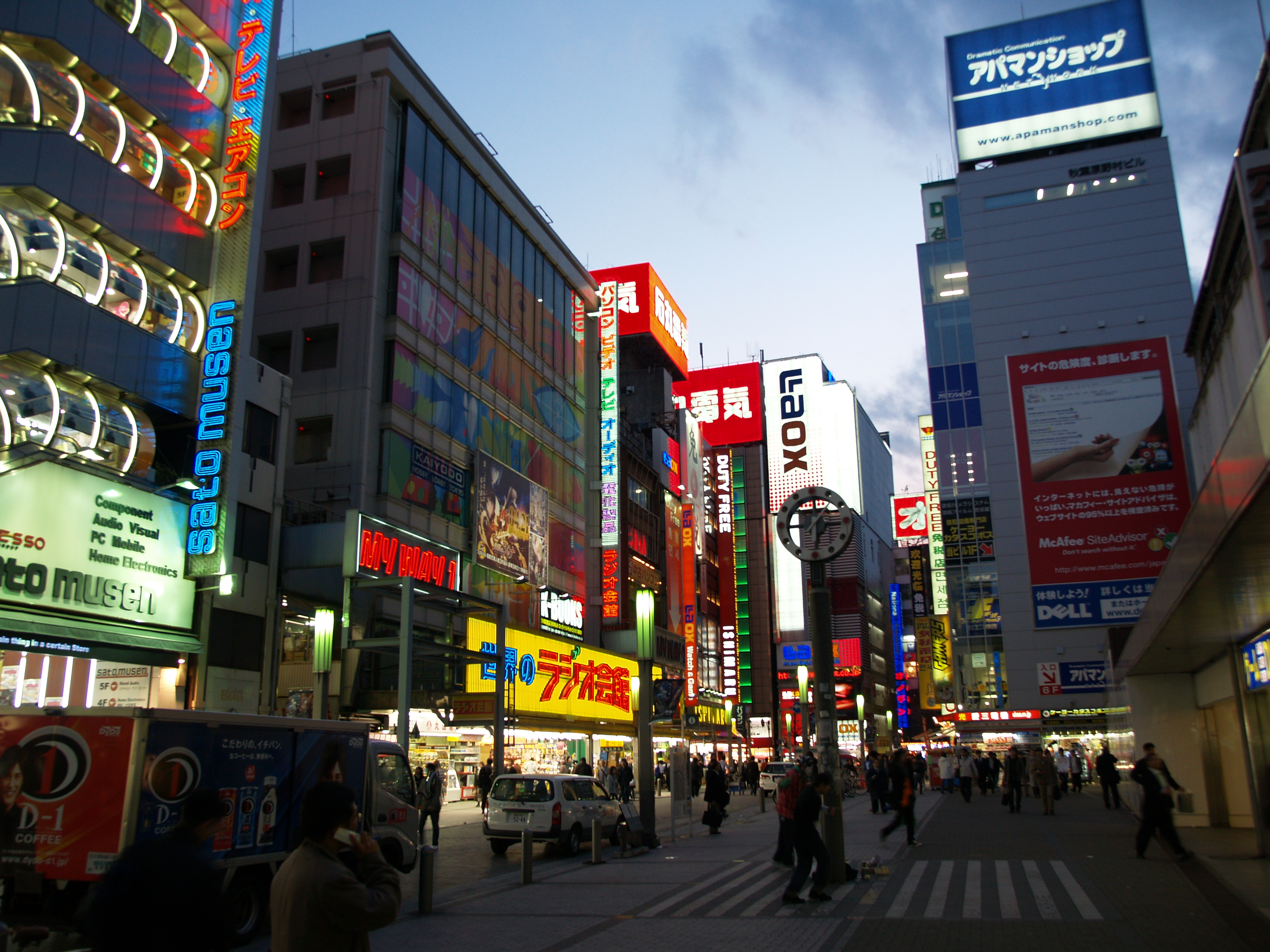 Akiba